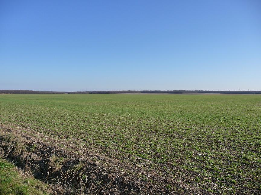 Plateau de Griselles soulignant la topographie plate de la commune